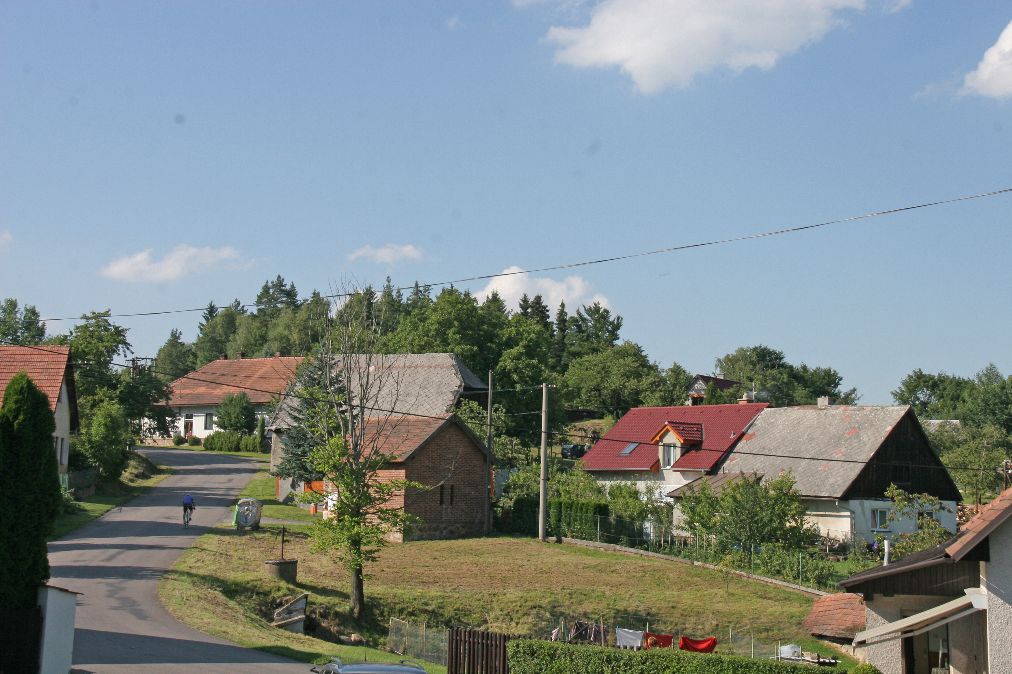 Prosíčka u Seče